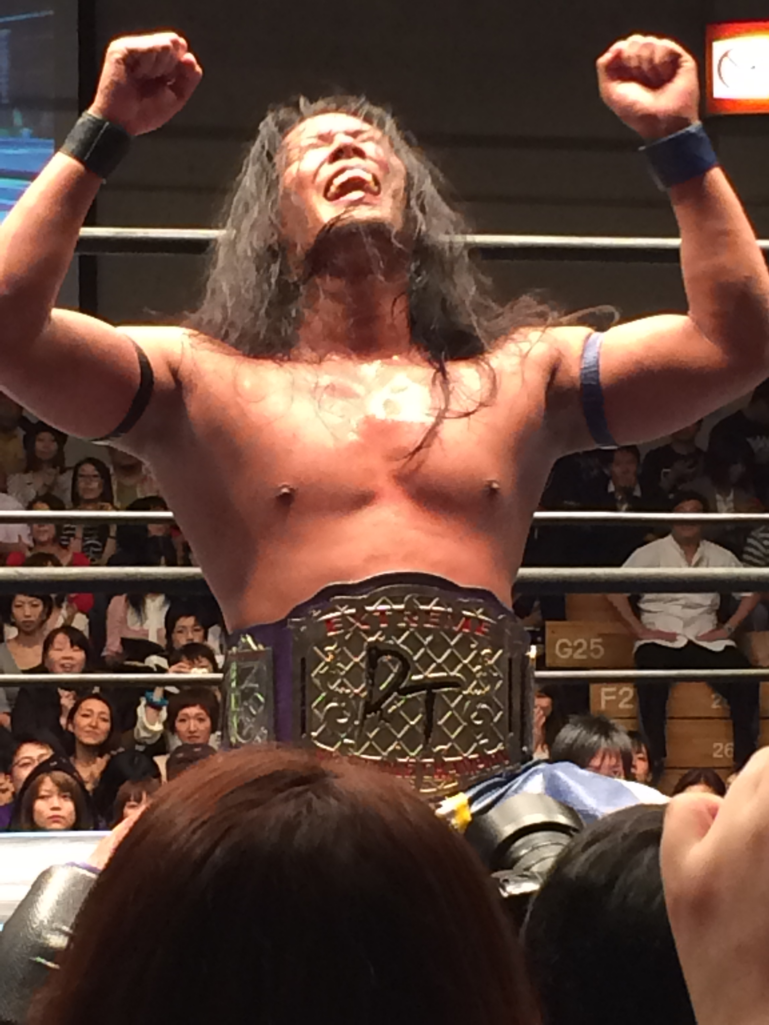 EXTREME初戴冠